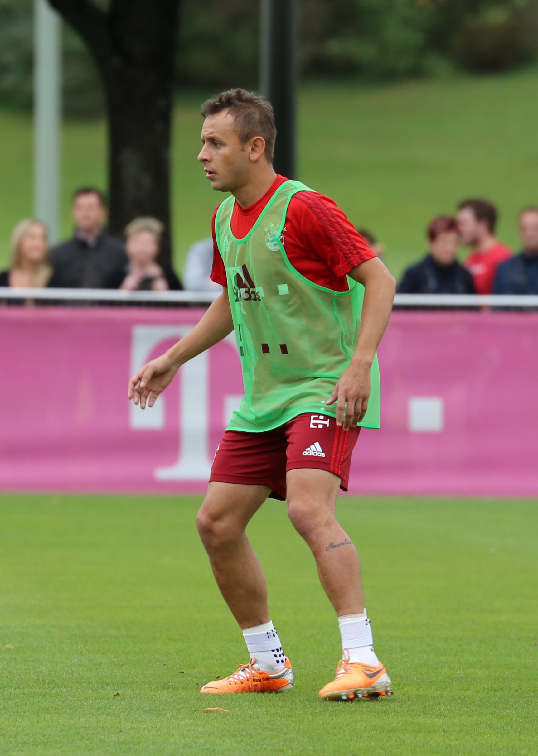 Rafinha beim Training auf dem Gelände des FC Bayern München